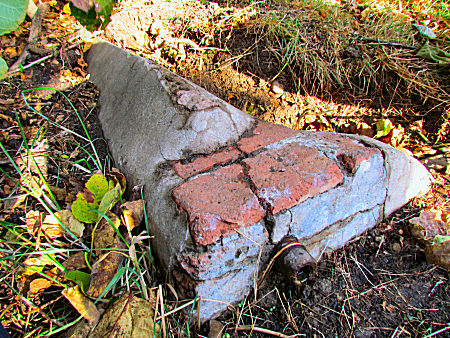 Detalle de la Fuente La Higuerilla